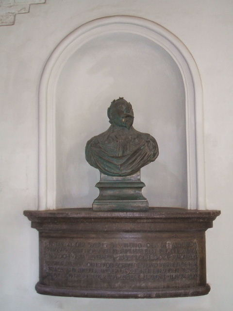 Stralsund, Germany, Büste von Gustav Adolf im Rathausdurchgang